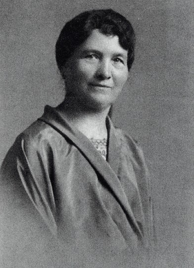 Františka Kyselková (1865 - 1951), Česká etnografka.